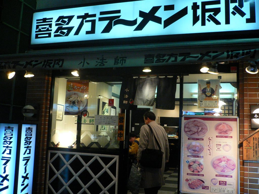 喜多方ラーメン専門店（東京の「坂内」[1]）japan_tokyo_tuesday5